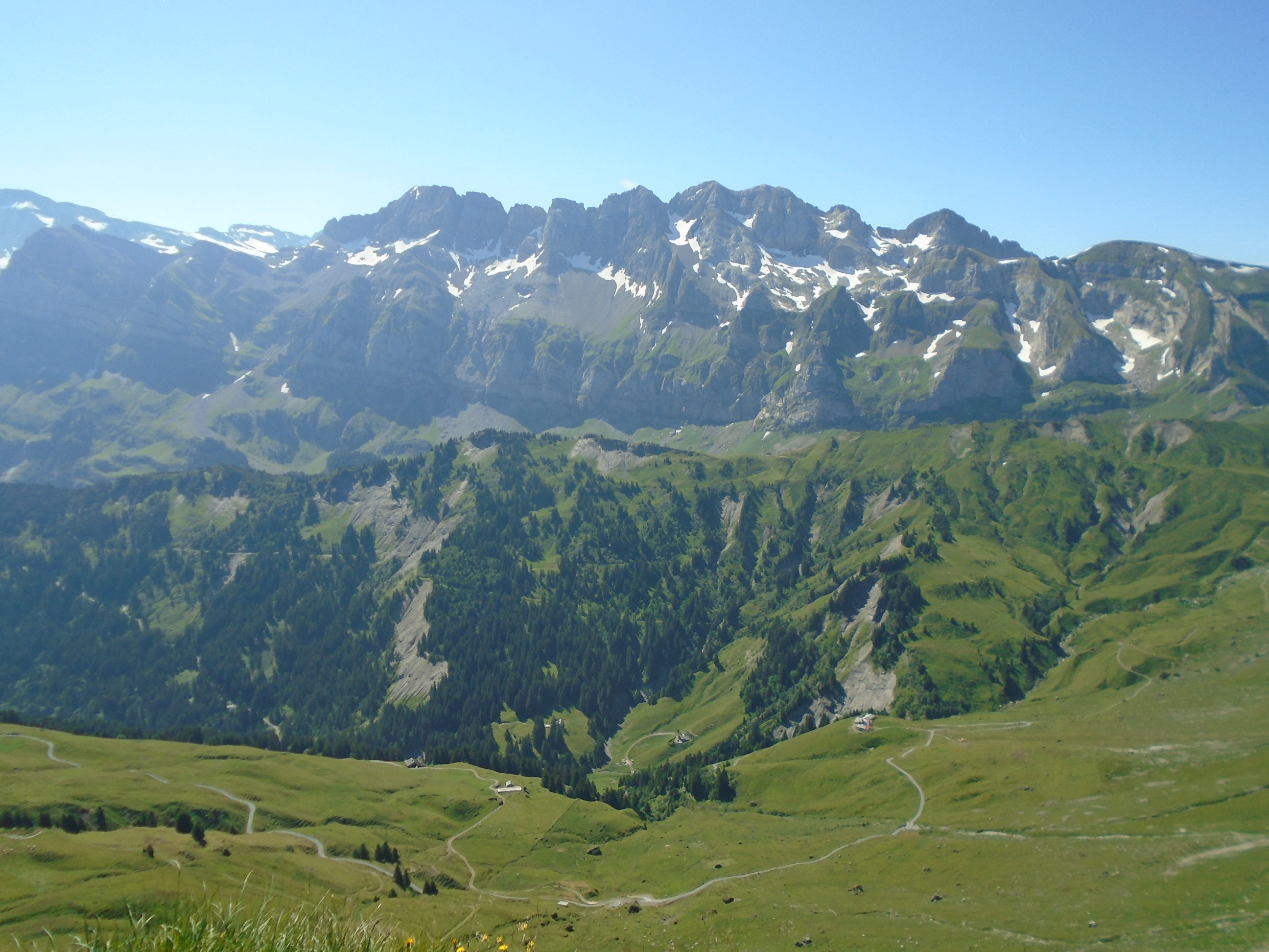 Horský masiv Dents Blanches (2 757 m) v kantonu Valais